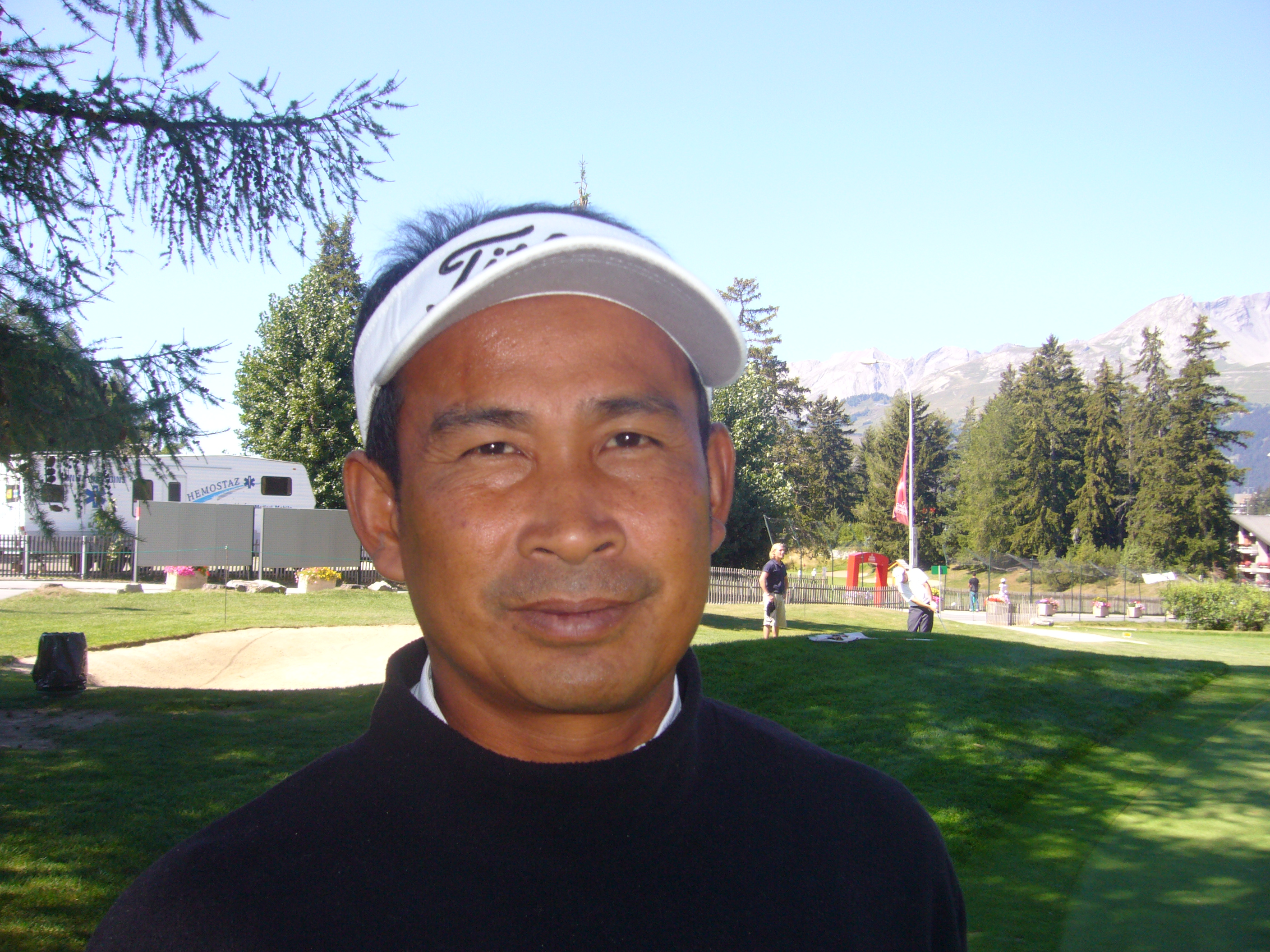 Thaworn Wiratchant